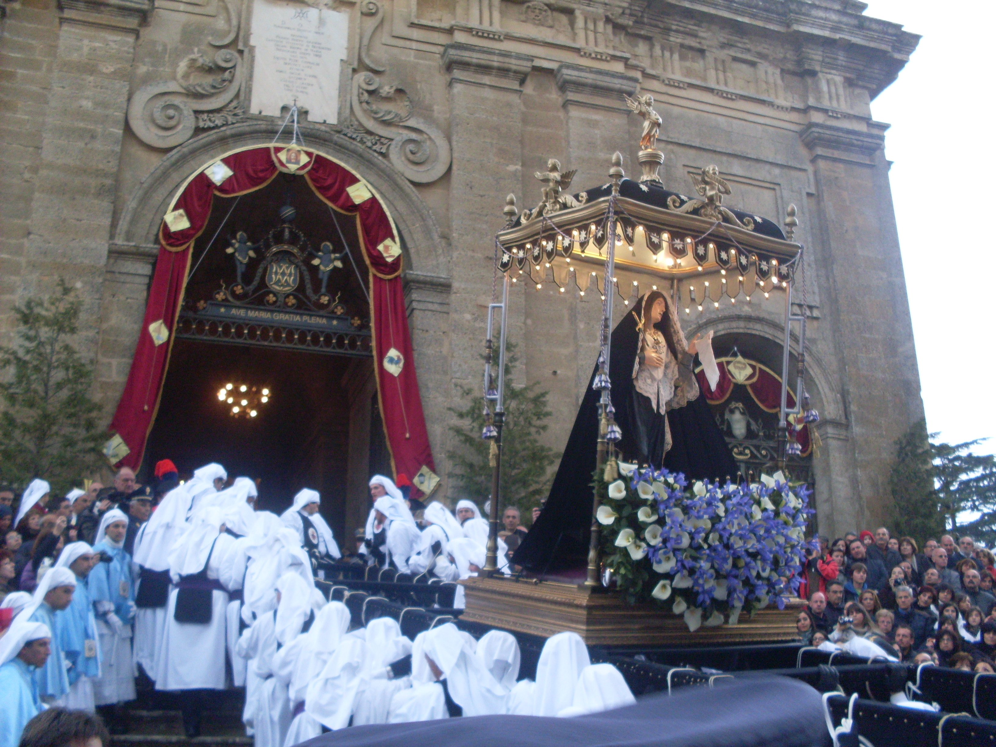 La Vergine Addolorata sta per entrare in Duomo.